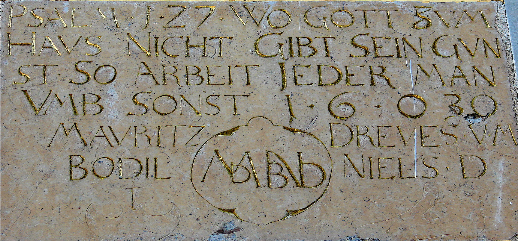 Tavle på hus i Kristianstad, Skåne, Sverige, med navnene Mavritz Dreves og Bodil Nielsdatter. Verset: Wo Gott Svm Haus Nicht Gibt Sein Gvnst, So Arbeit Ieder Man vmb Sonst.